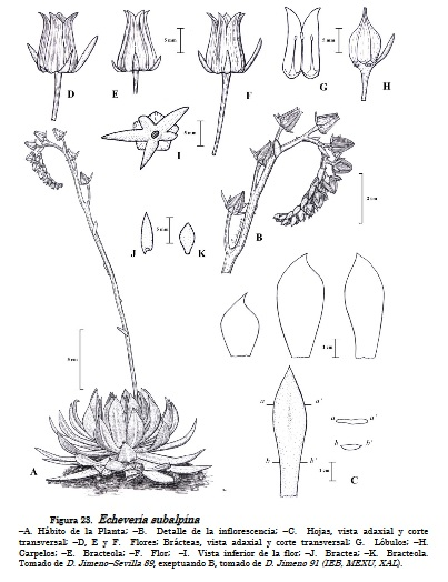 Ilustracion